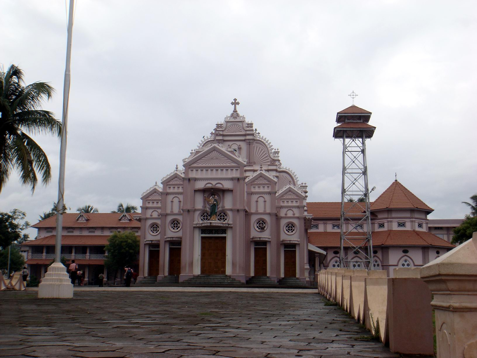 Cathedral, Irinjalakkuda